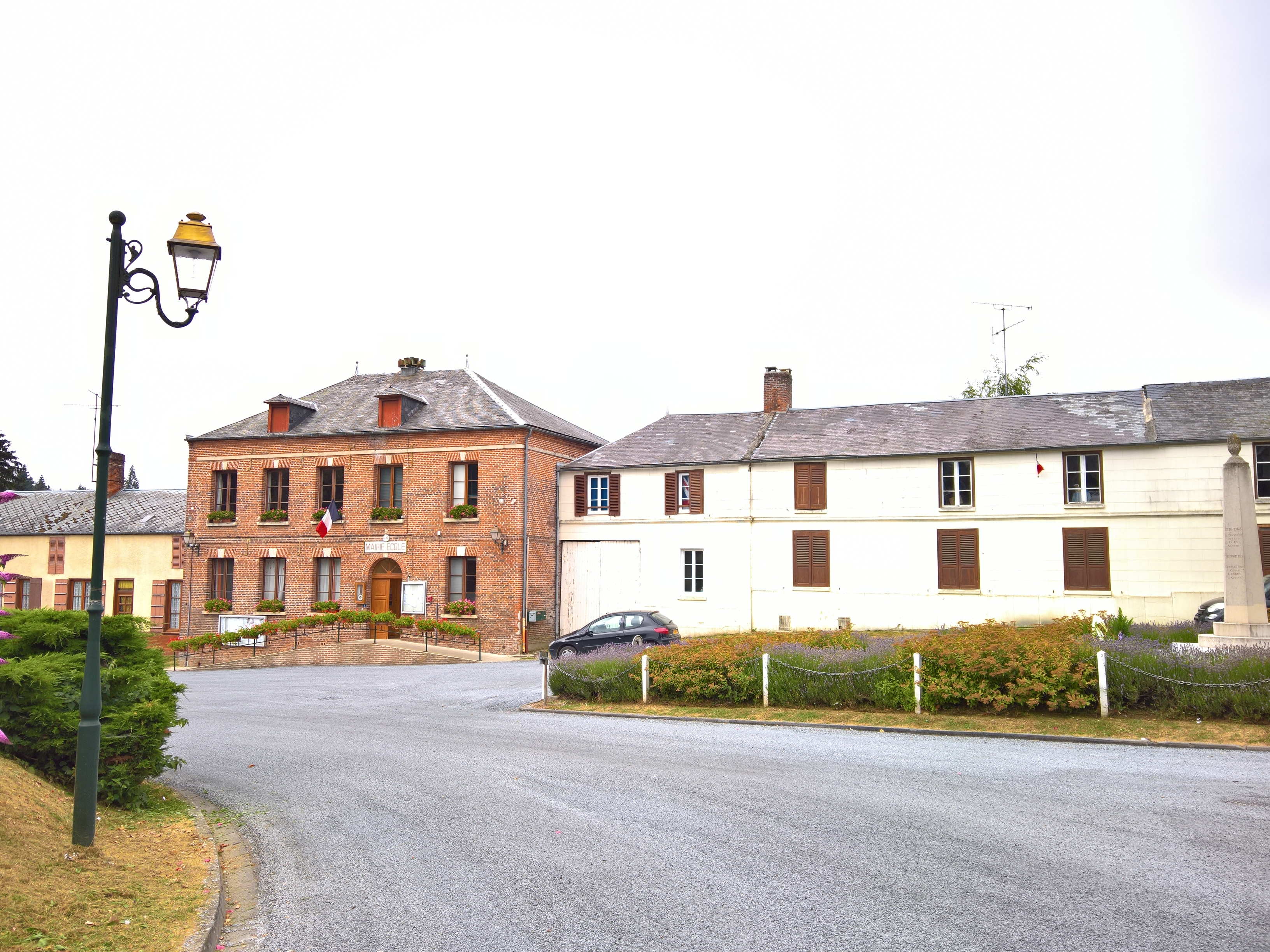 Cempuis - La mairie